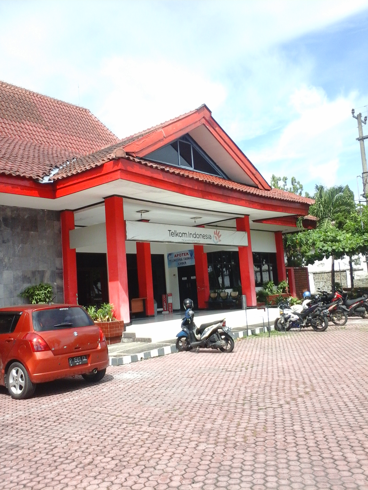 Tampak depan Sentra Telepon Otomat Jember 2, yang kini telah beralih fungsi menjadi Apotek Telemedika Farma 15